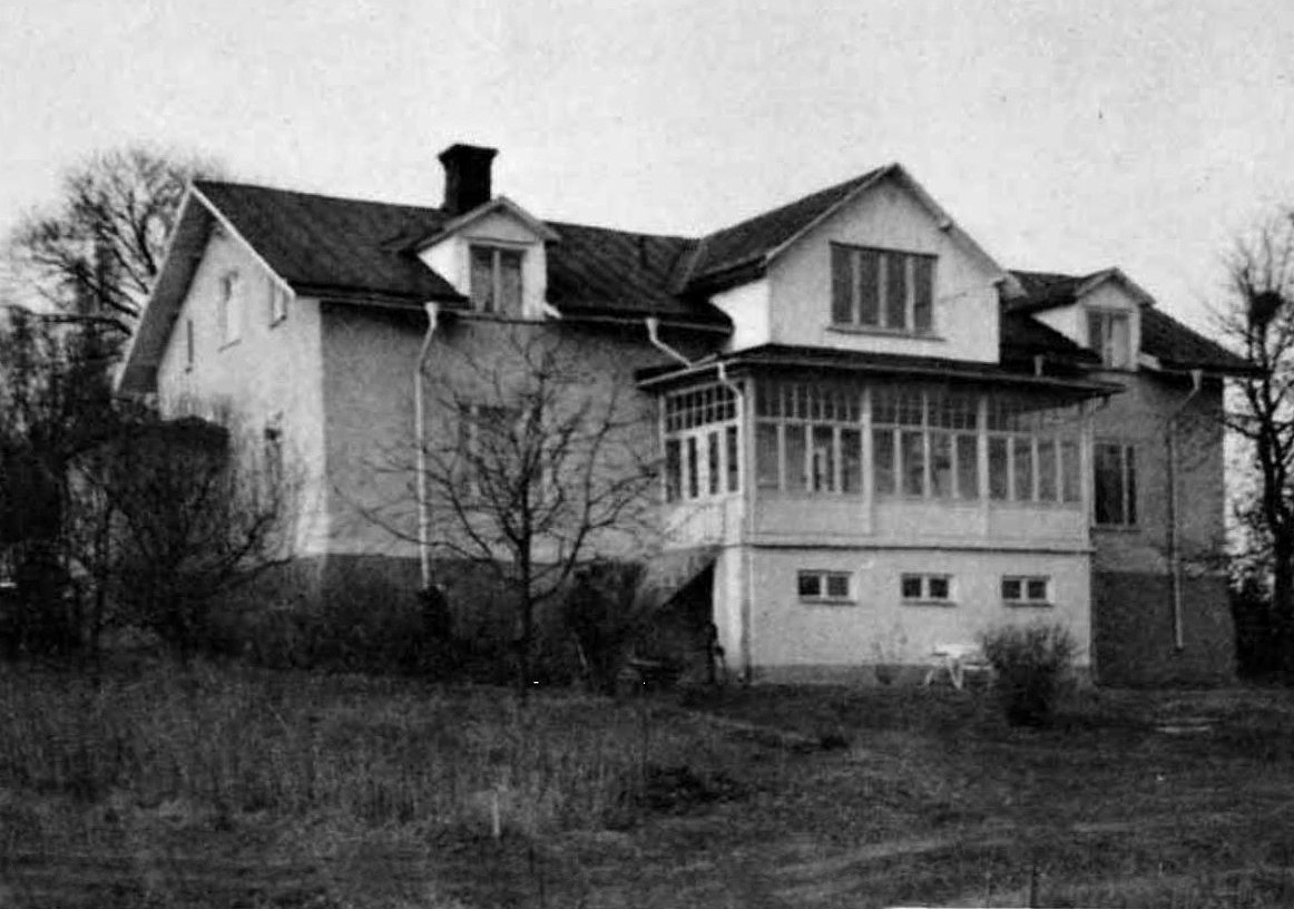 Snättringe gård i april 1968